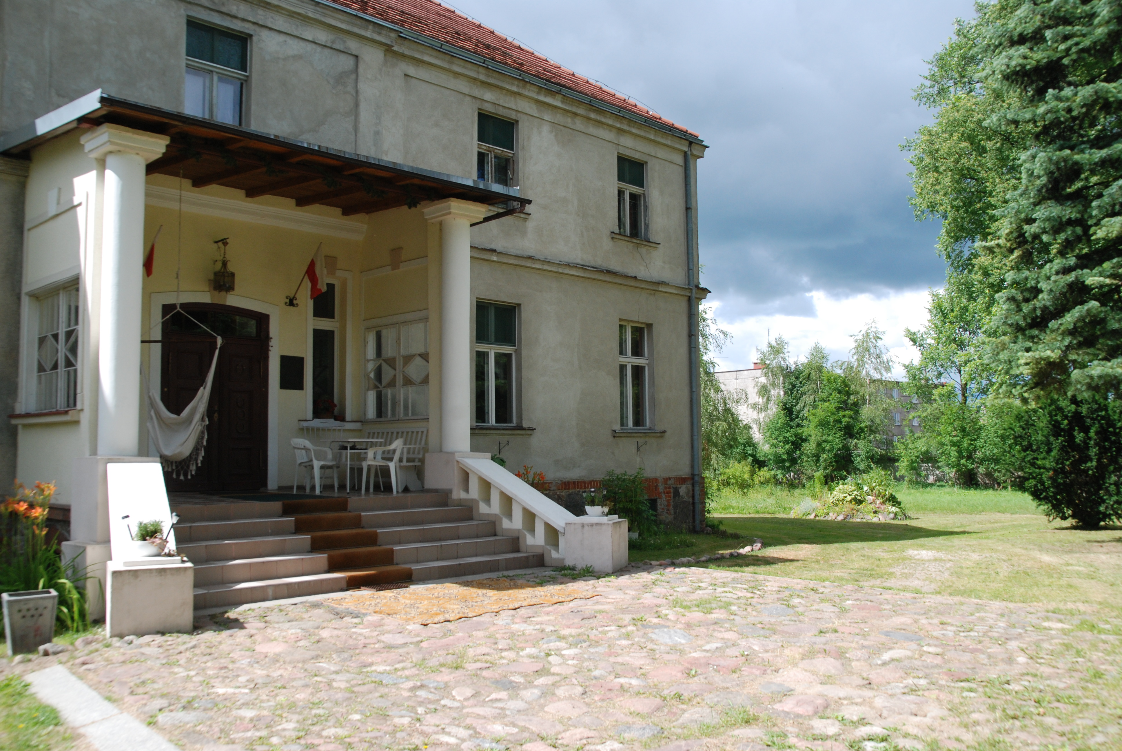 Sielec - dwór, ganek wejściowy, poł. XIX